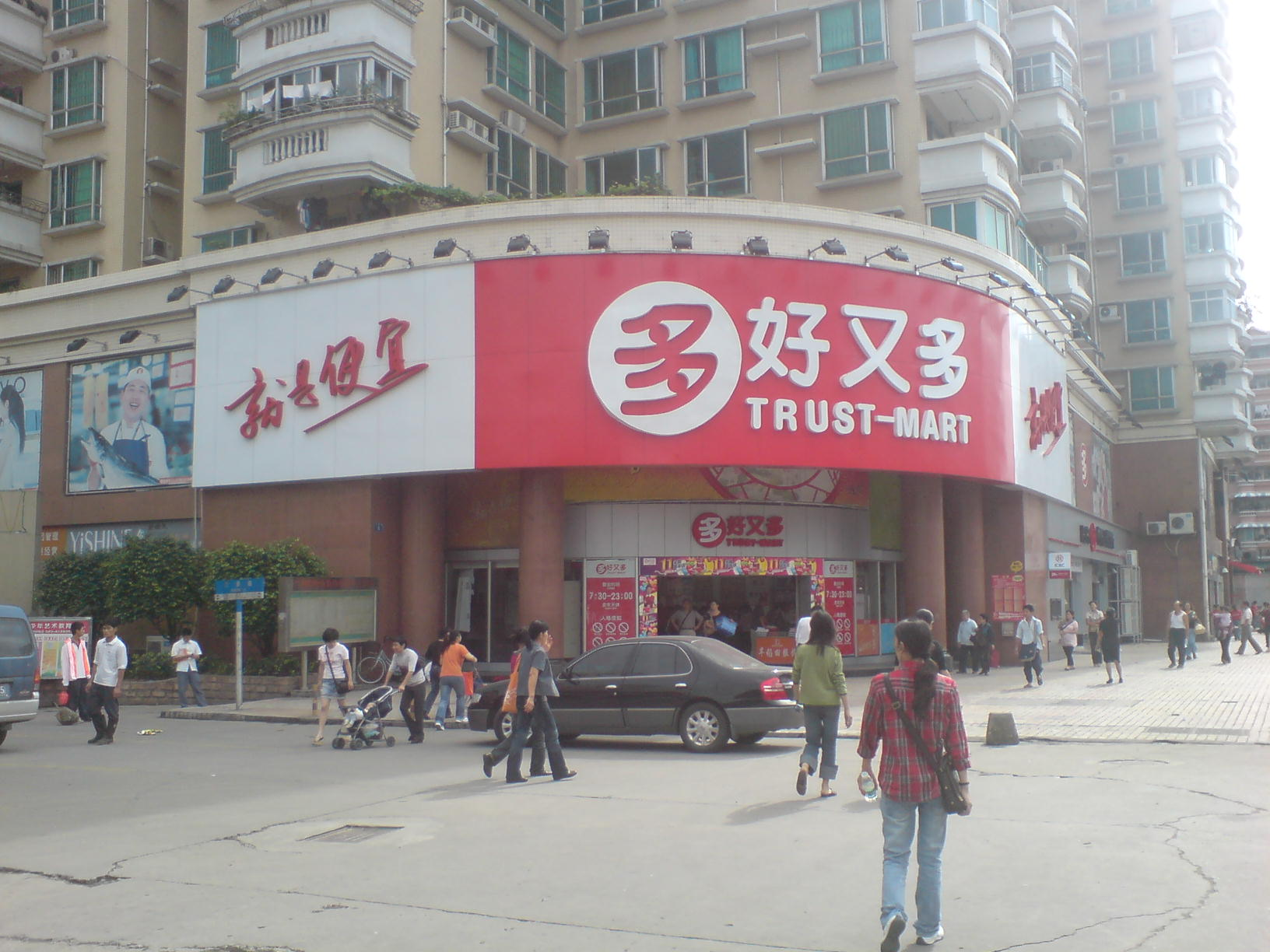 中文（中国大陆）: 位于广州市白云区的好又多云景店